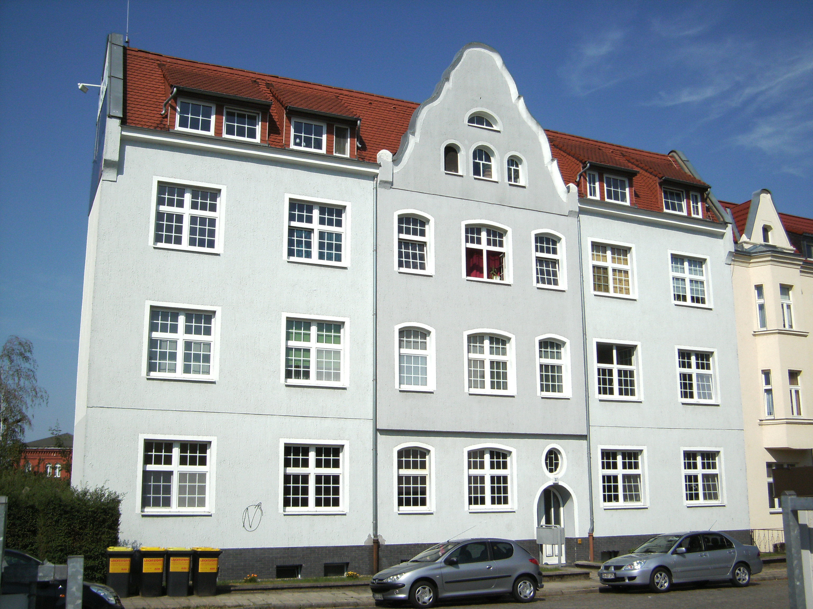 Wernerstr. 37